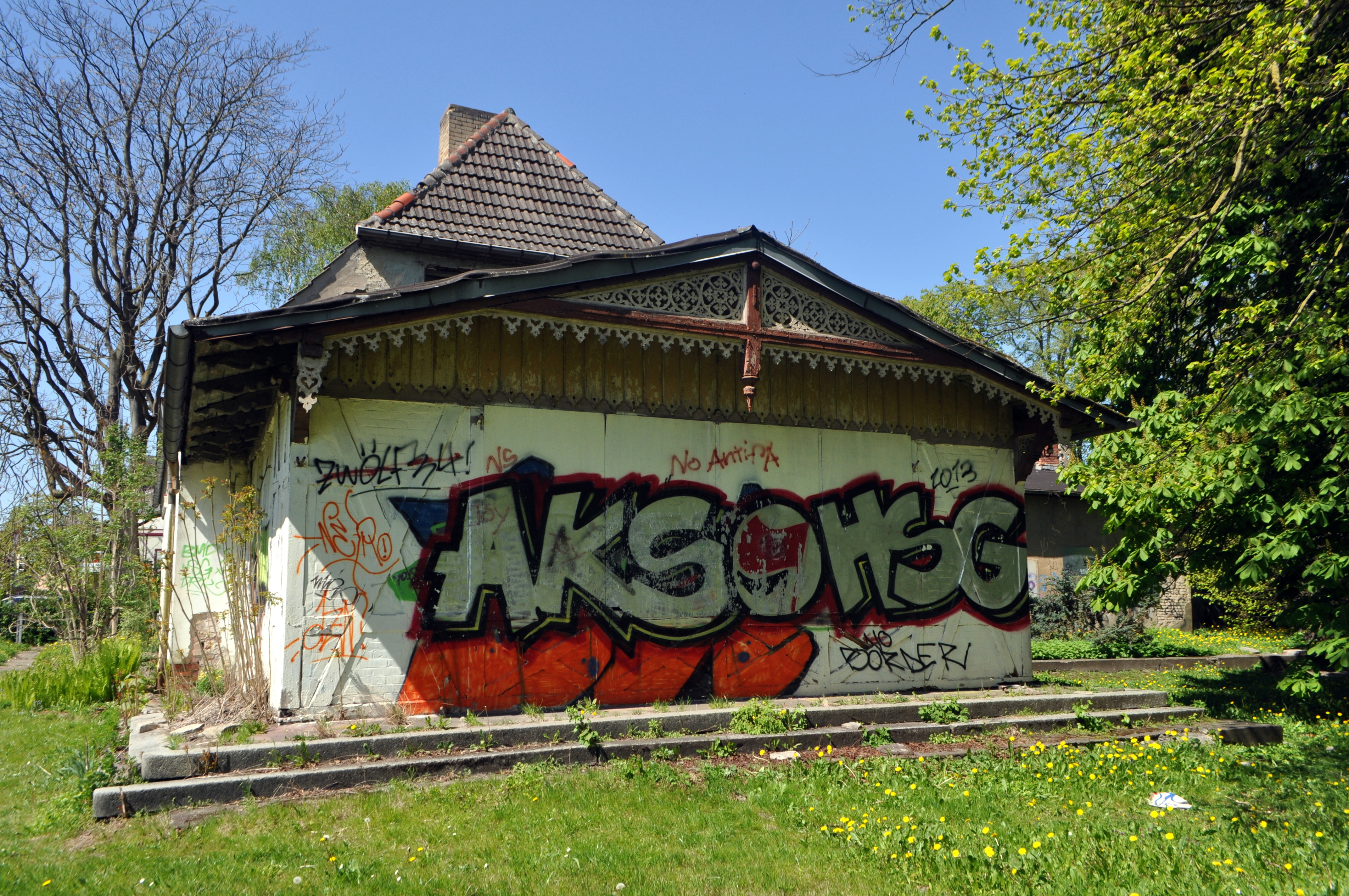 Das Bild zeigt Haus und Grundstück Knieperdamm 5 in Stralsund am 7. Mai 2016. Das im Jahr 1850 errichtete, unter Denkmalschutz stehende, zuletzt verfallene Haus wurde am 11. November 2017 abgerissen. Auf dem Grundstück steht eine etwa 300 Jahre alte Eibe, der wahrscheinlich älteste Baum Stralsunds.